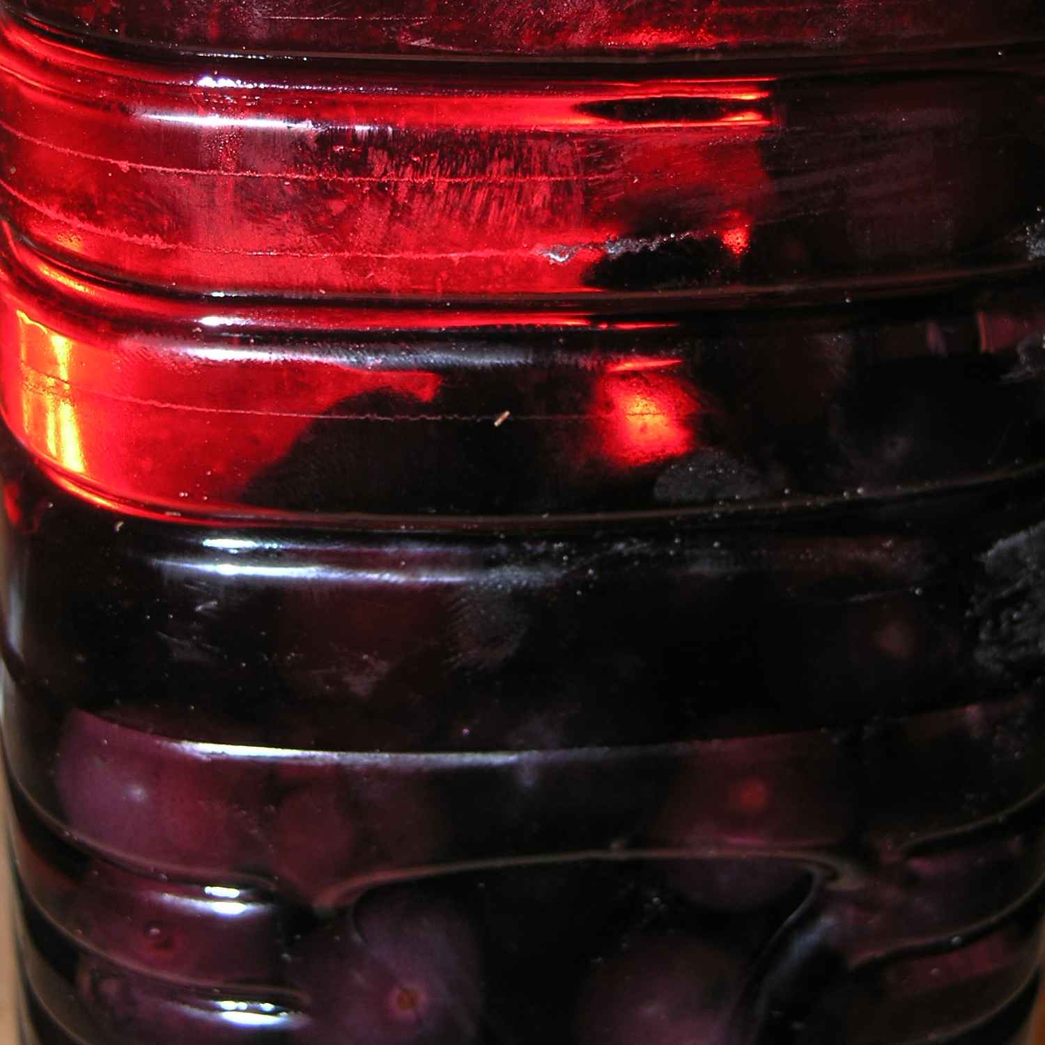 Homemade damson gin